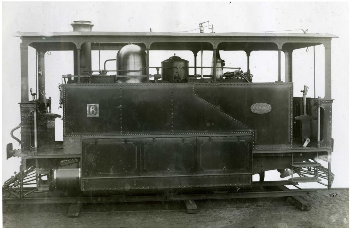 Tubize 1067 de 1896 pour les Chemins de Fer de la Basse-Egypte (n° 6). Photographie d’usine, coll. Musée ‘de la Porte’ à Tubize